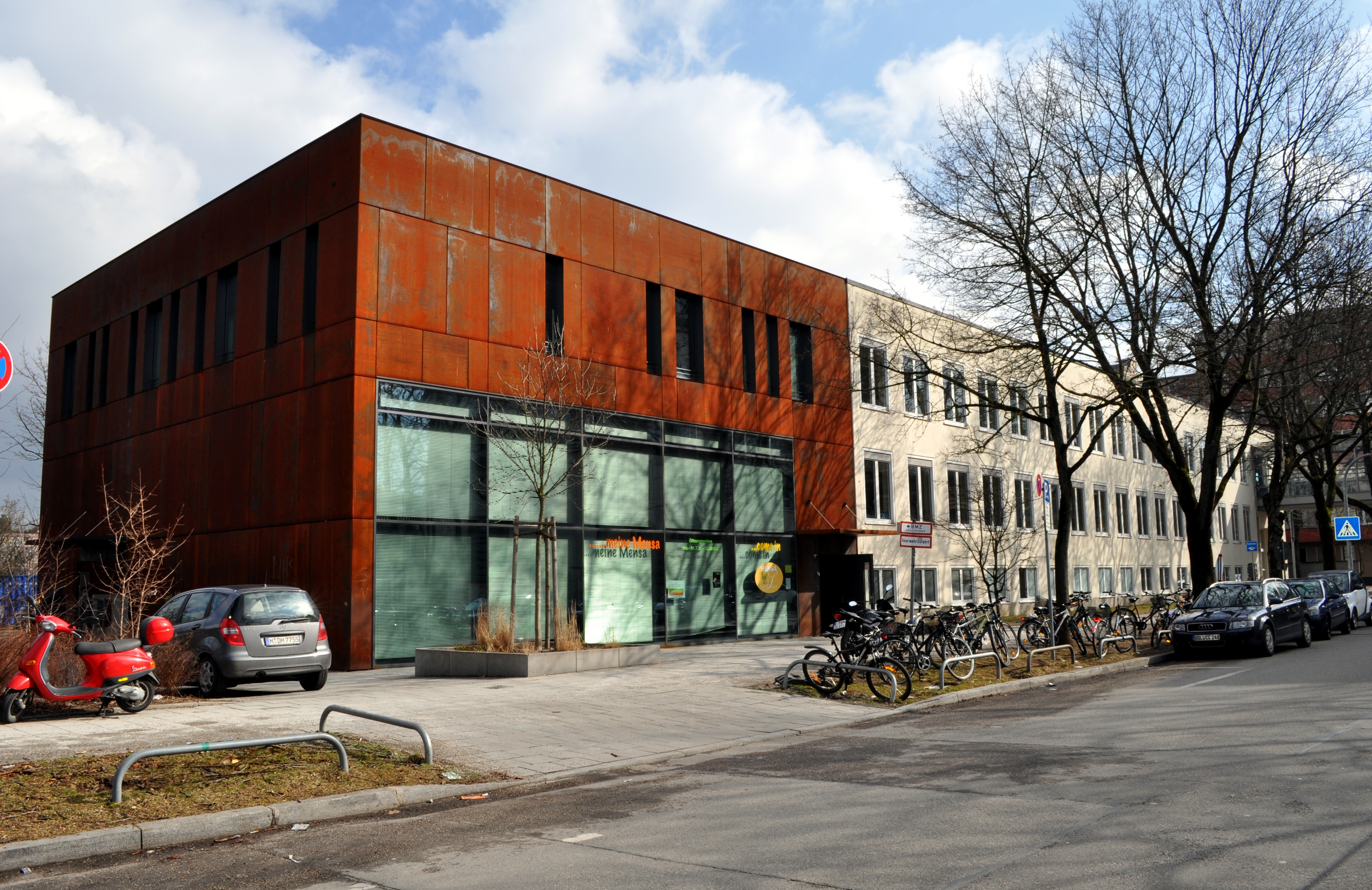 Neubau des Rupprecht-Gymnasiums in München-Neuhausen